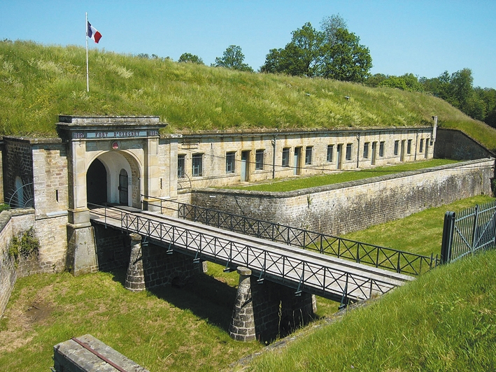 Entrée du fort d'Uxegney